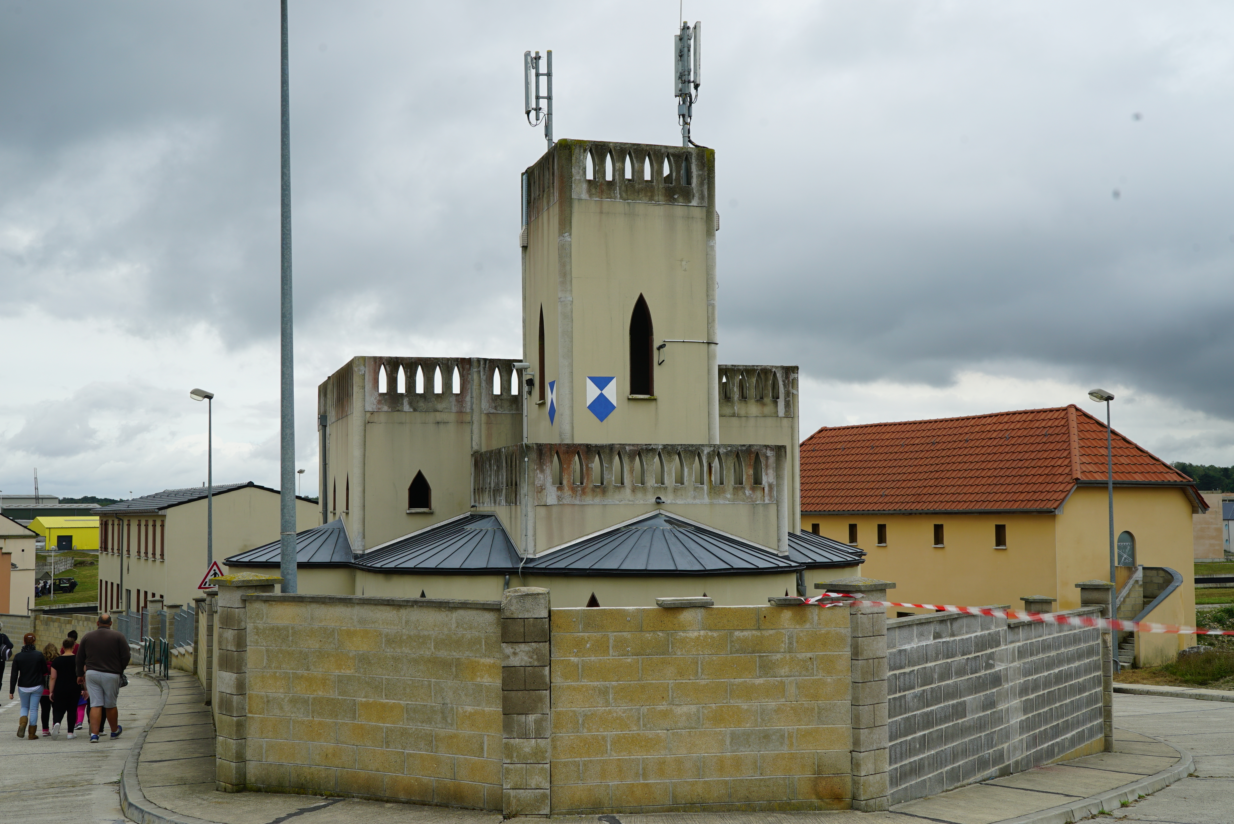 dans Jeoffrécourt, journée portes ouvertes.